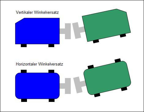 Zeigt den horizontalen und vertikalen Winkelversatz